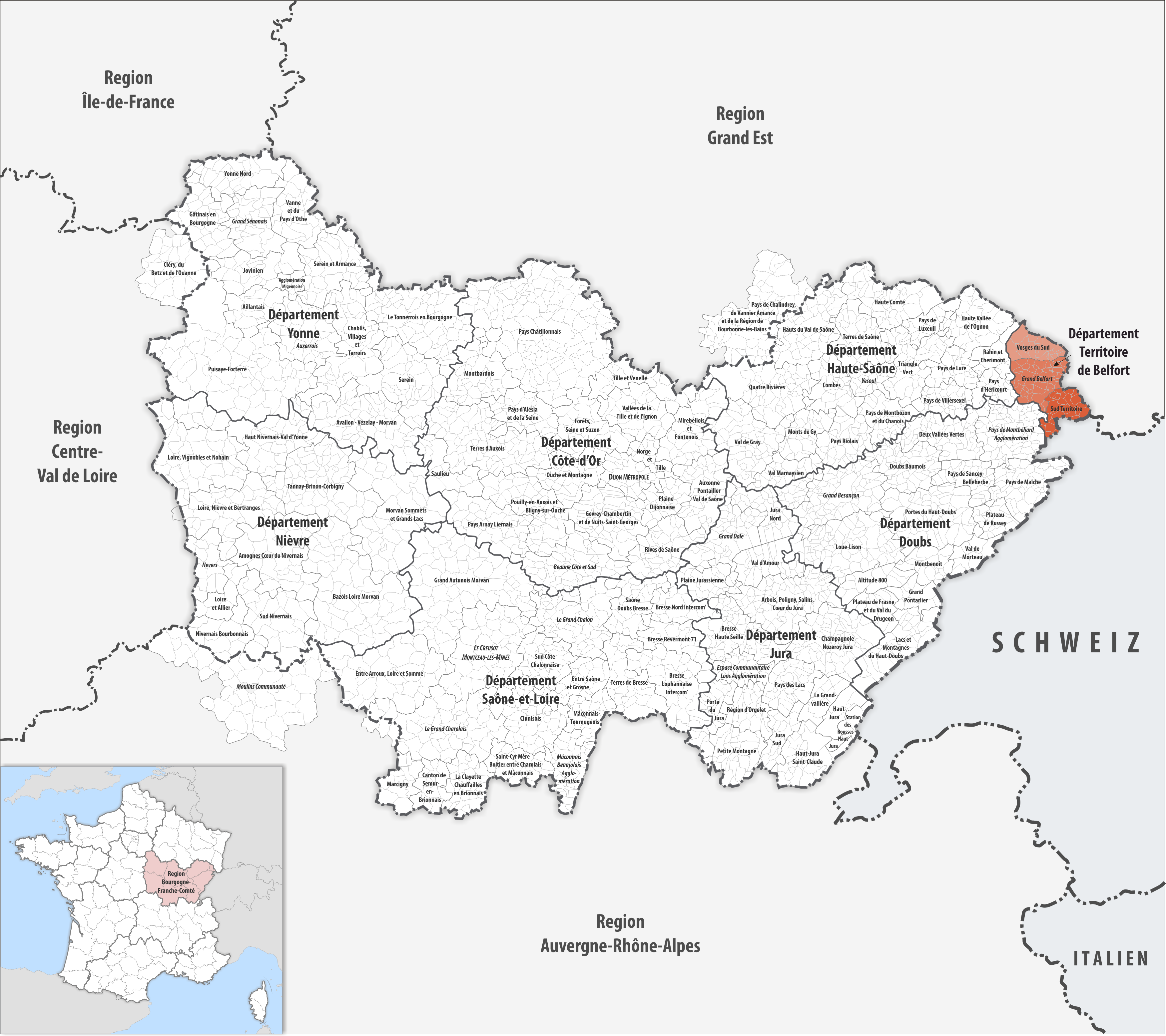 Lage des Gemeindeverbandes Territoire de Belfort